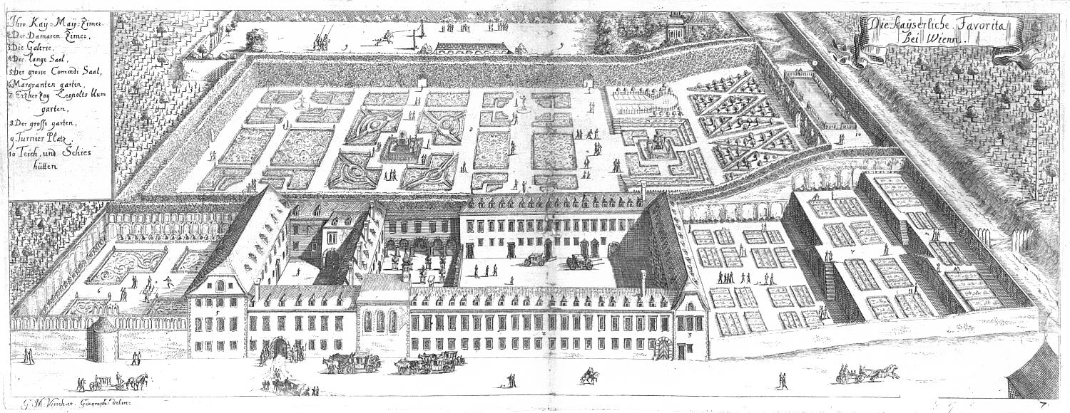 Georg Matthaeus Vischer: A bécsi Theresianumnak helyet adó épület a Favorita palota 1670 körül